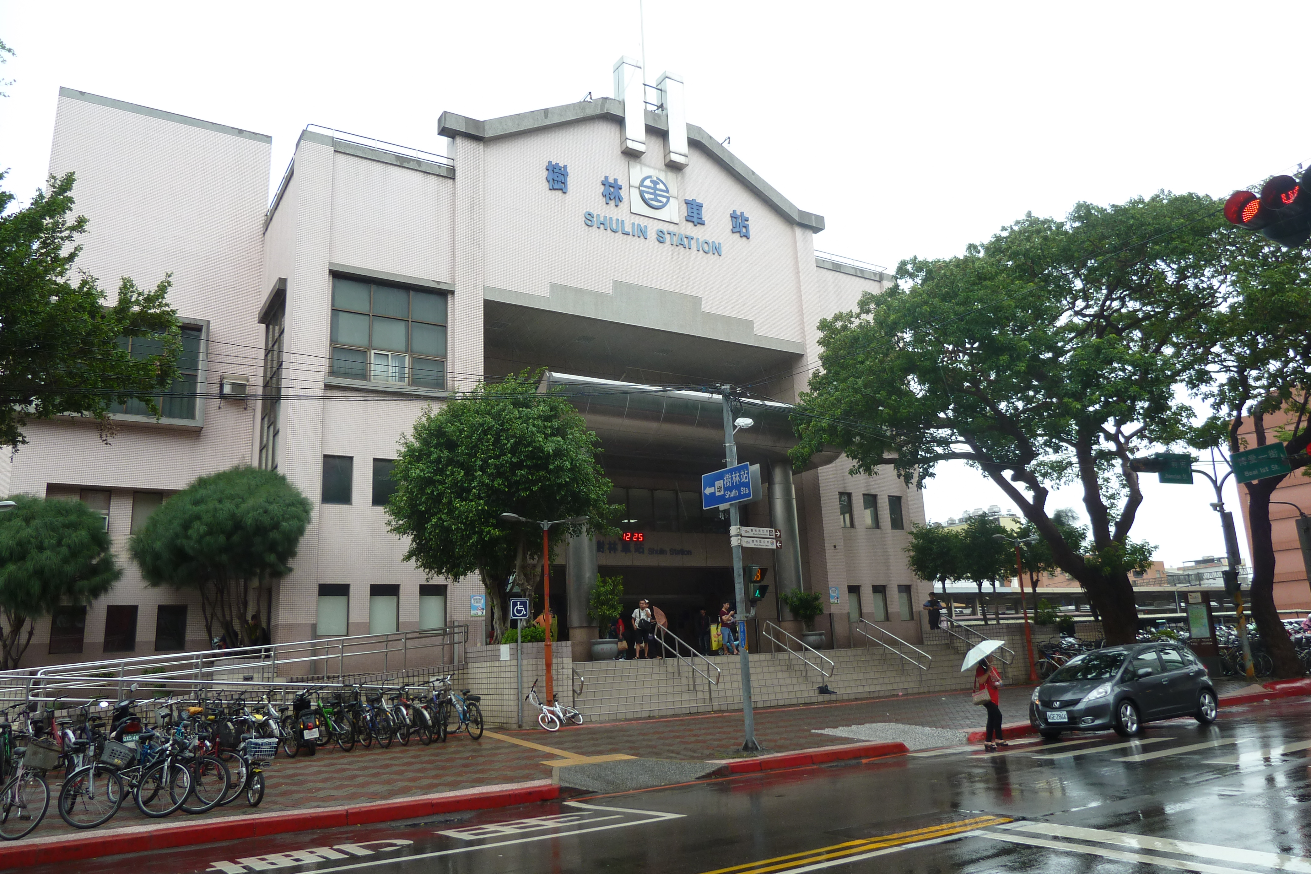 臺灣鐵路管理局樹林車站前站。